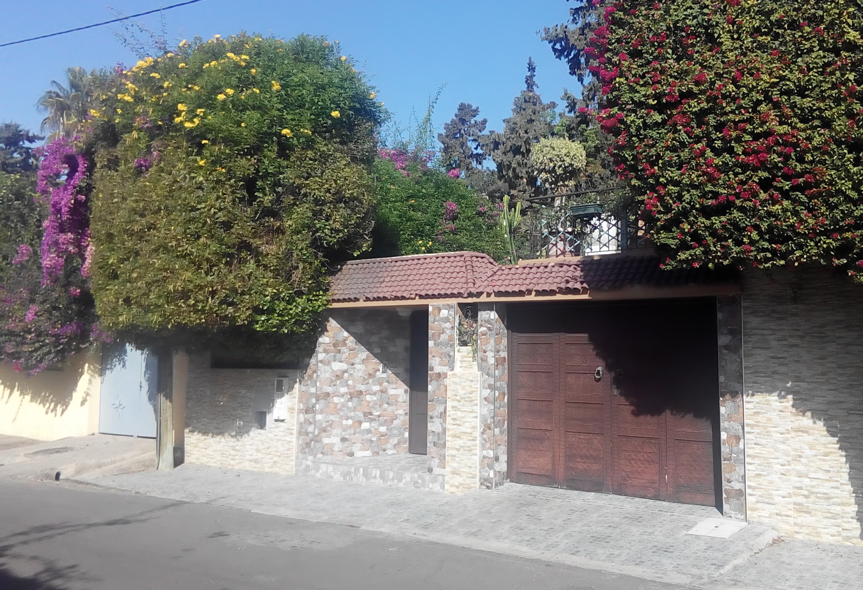 Agadir (2017), Schweizer Viertel (Villa)